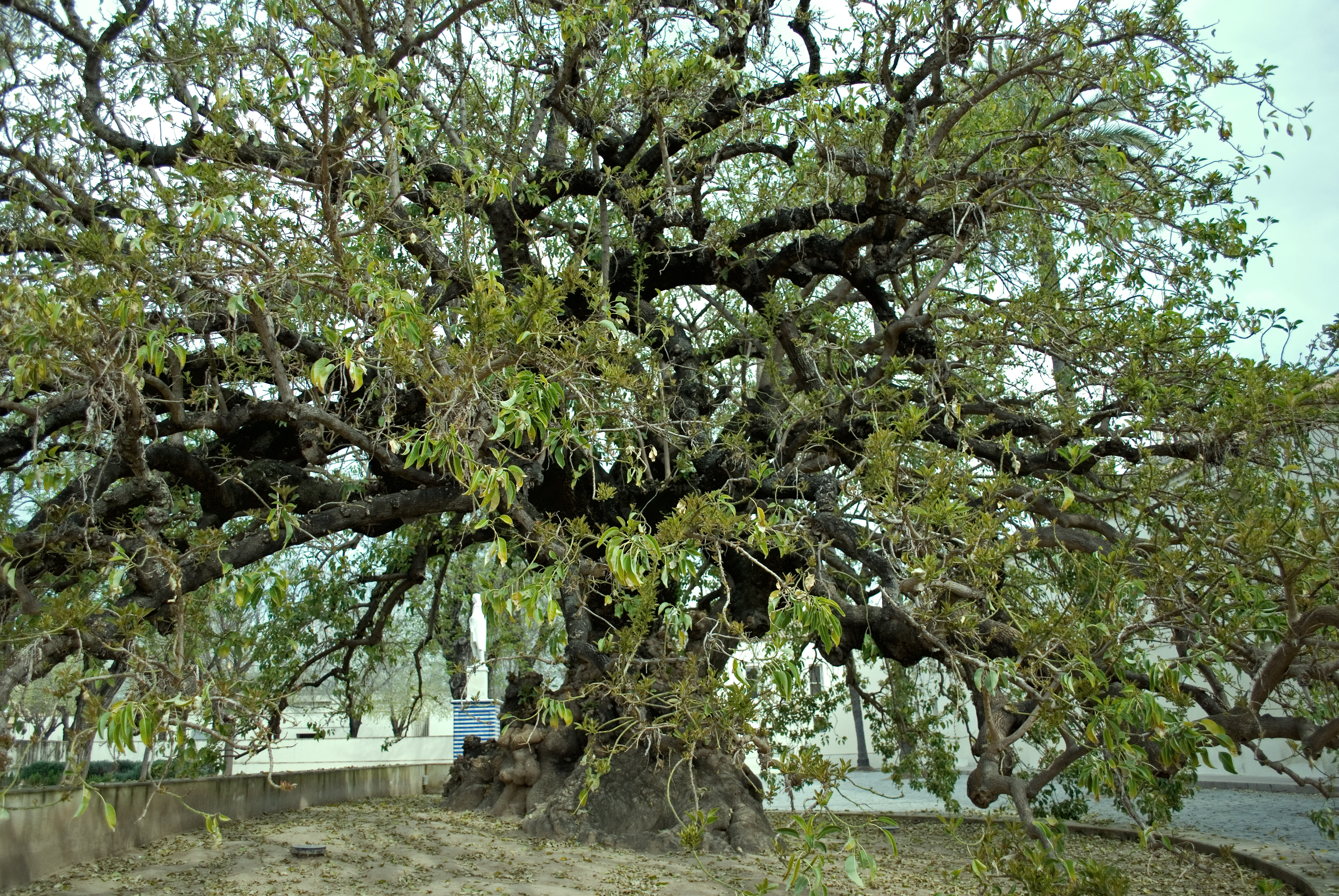 Vista de ejemplar de ombú, en el Monasterio de la Cartuja de Sevilla